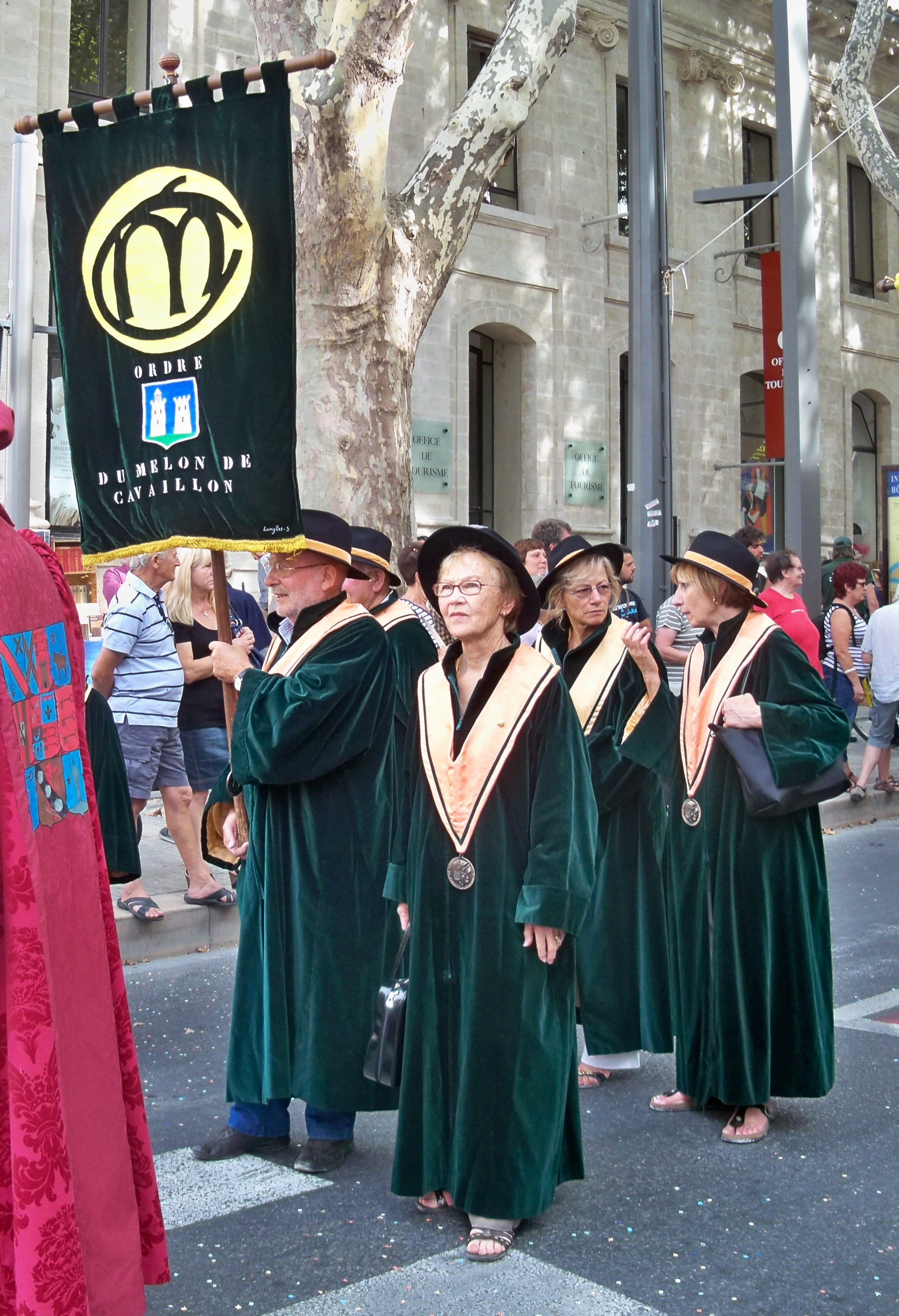 Confrérie du Melon de Cavaillon (Vaucluse, France)